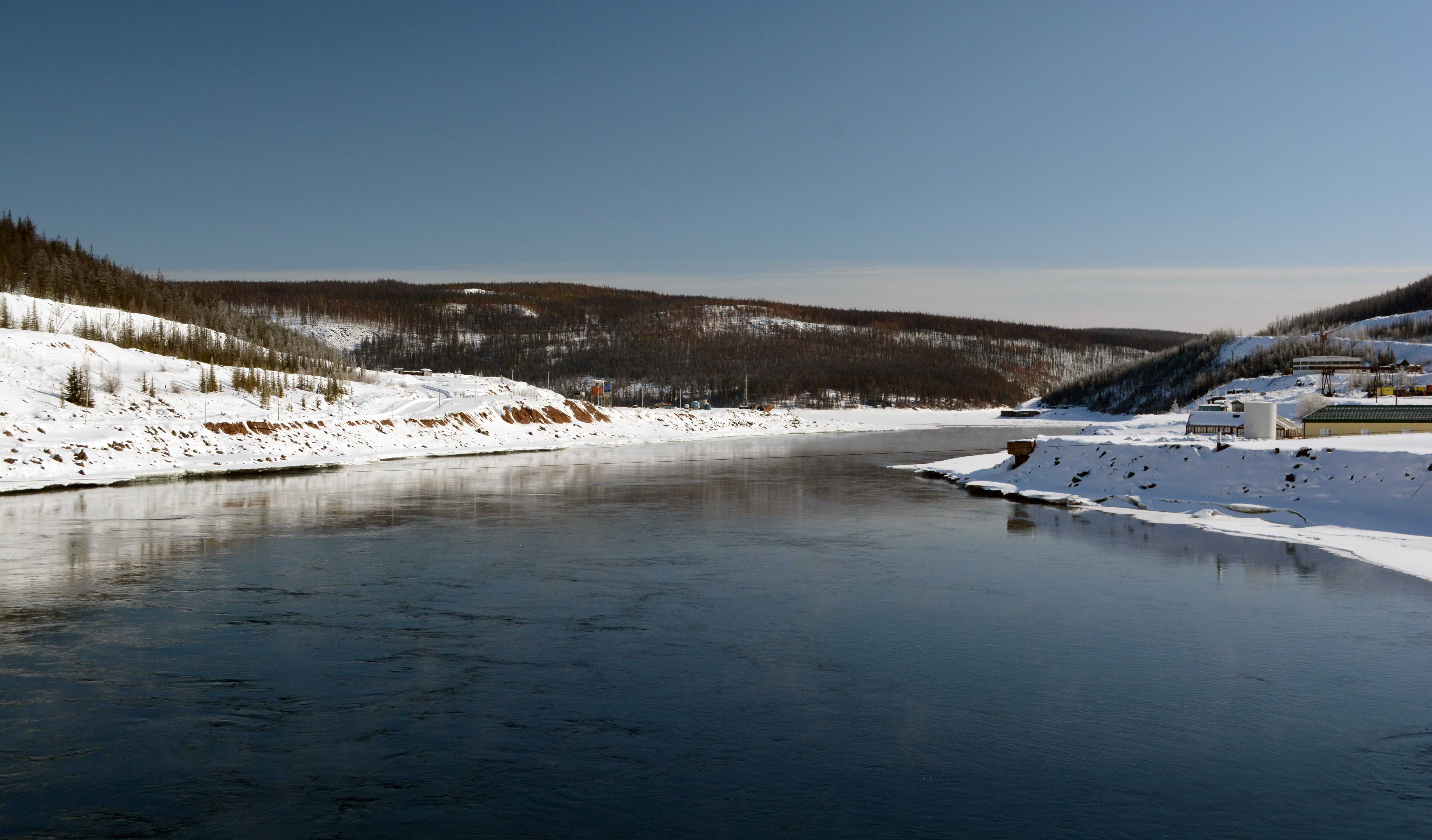 Река Вилюй (у Светлинской ГЭС, Республика Саха (Якутия), Россия